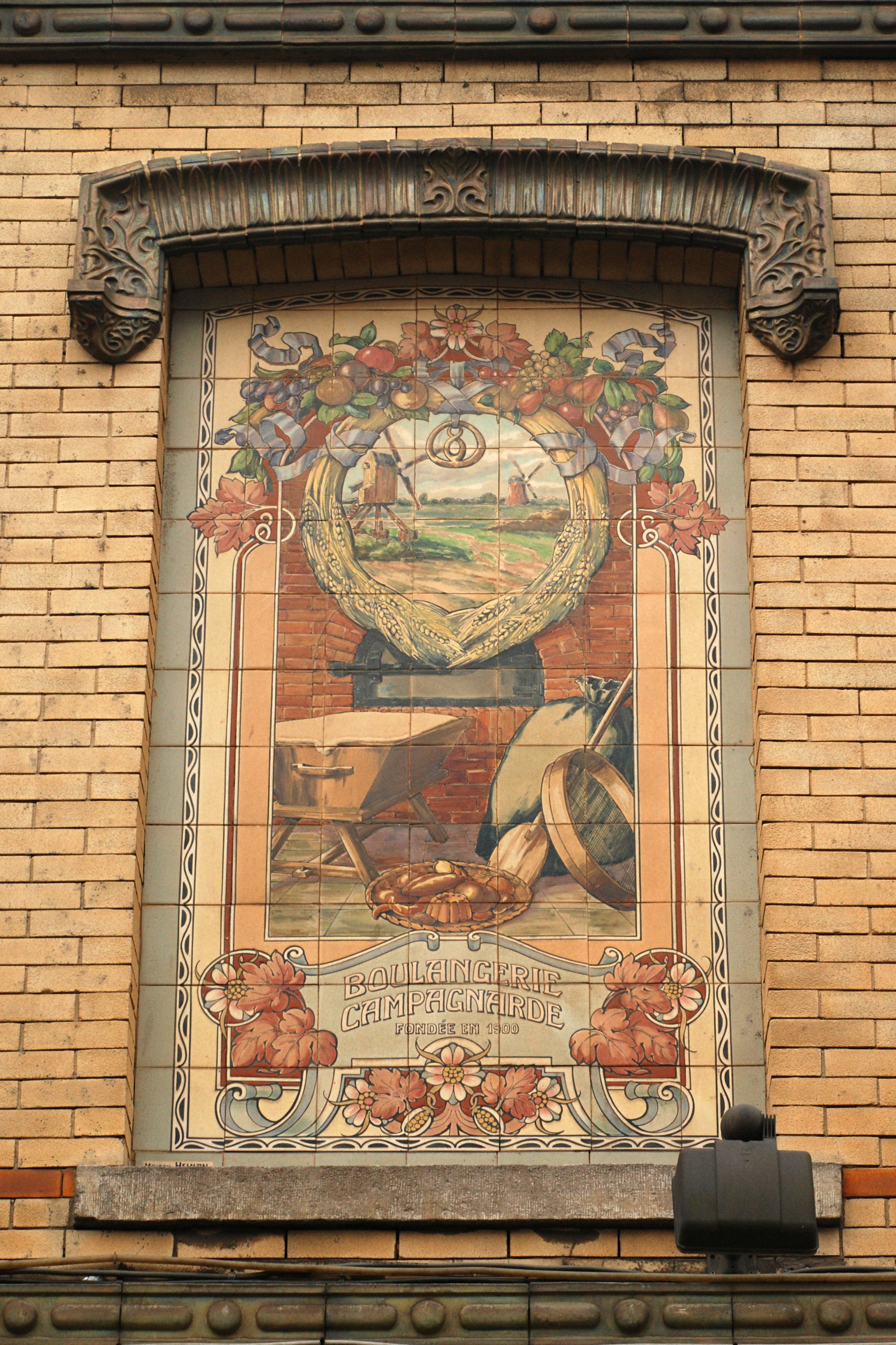 Belgique - Bruxelles - Berchem-Sainte-Agathe - Chaussée de Gand 1224 - Art nouveau - Célestin Joseph Helman